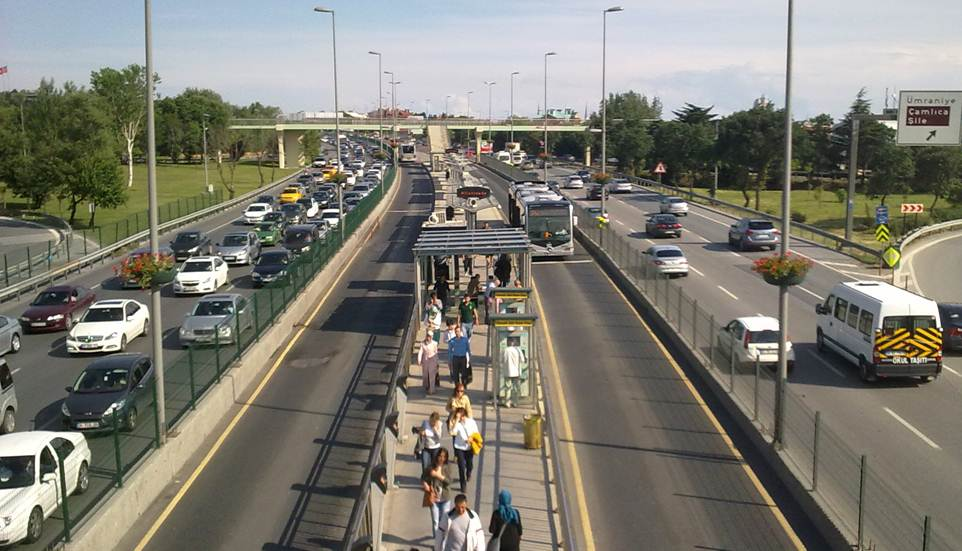 Altunizade metrobüs durağı üstgeçidinden metrobüs hattının görünümü